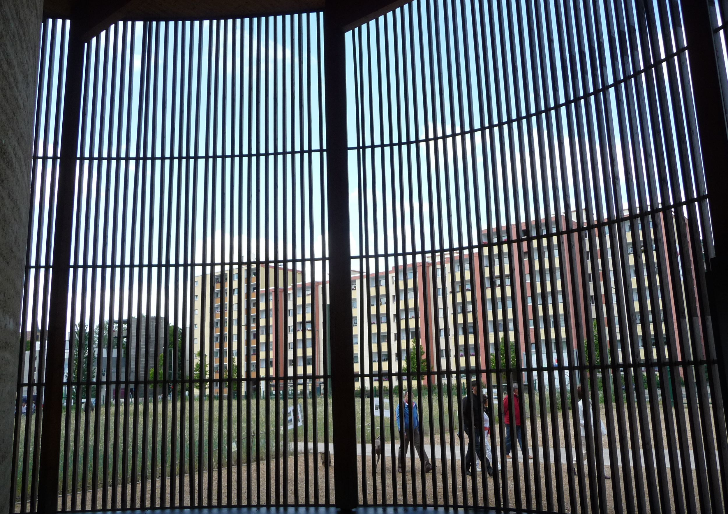 Kapelle der Versöhnung in Berlin